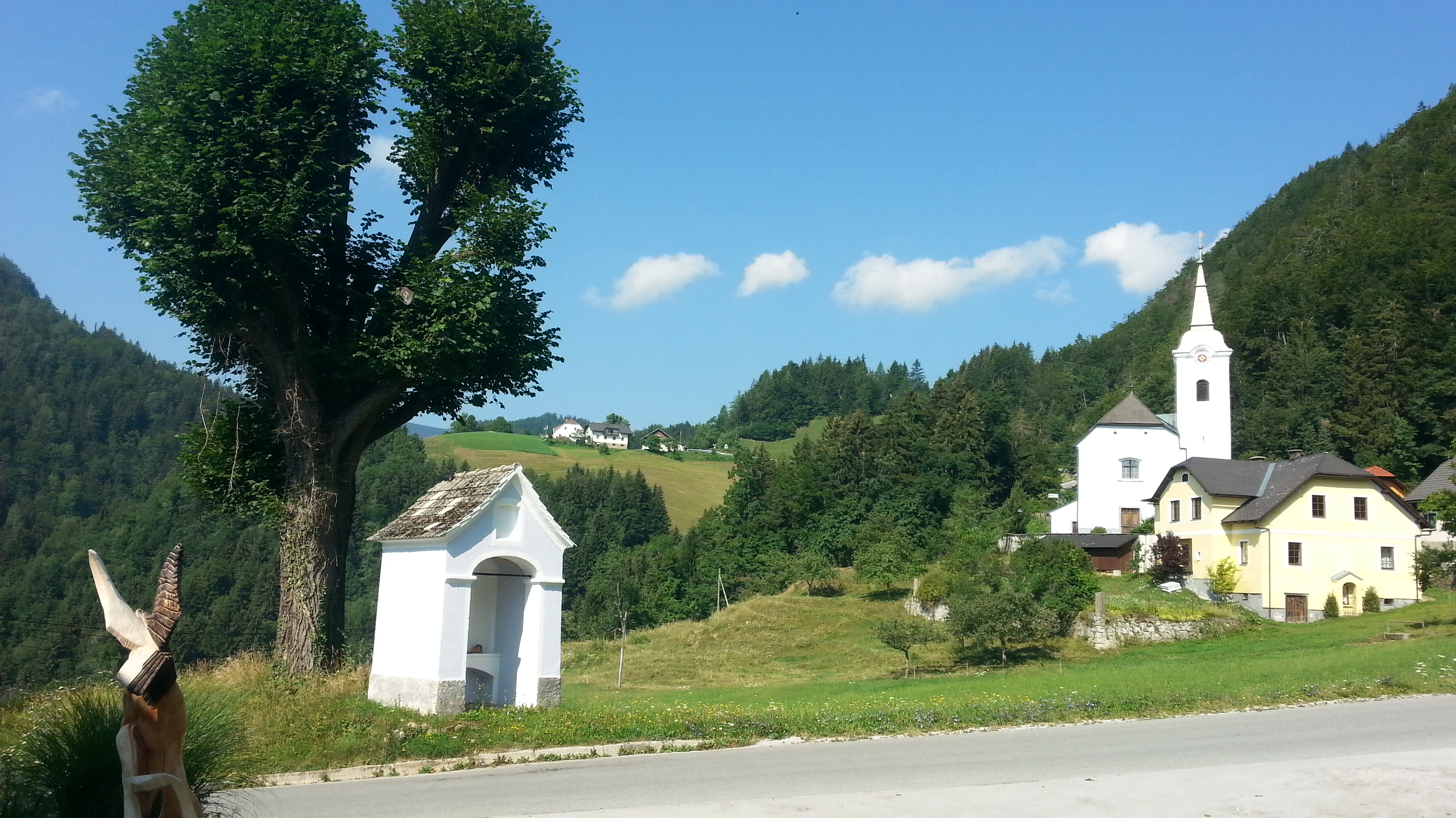 Župnijska cerkev sv. Andreja, Bele Vode.